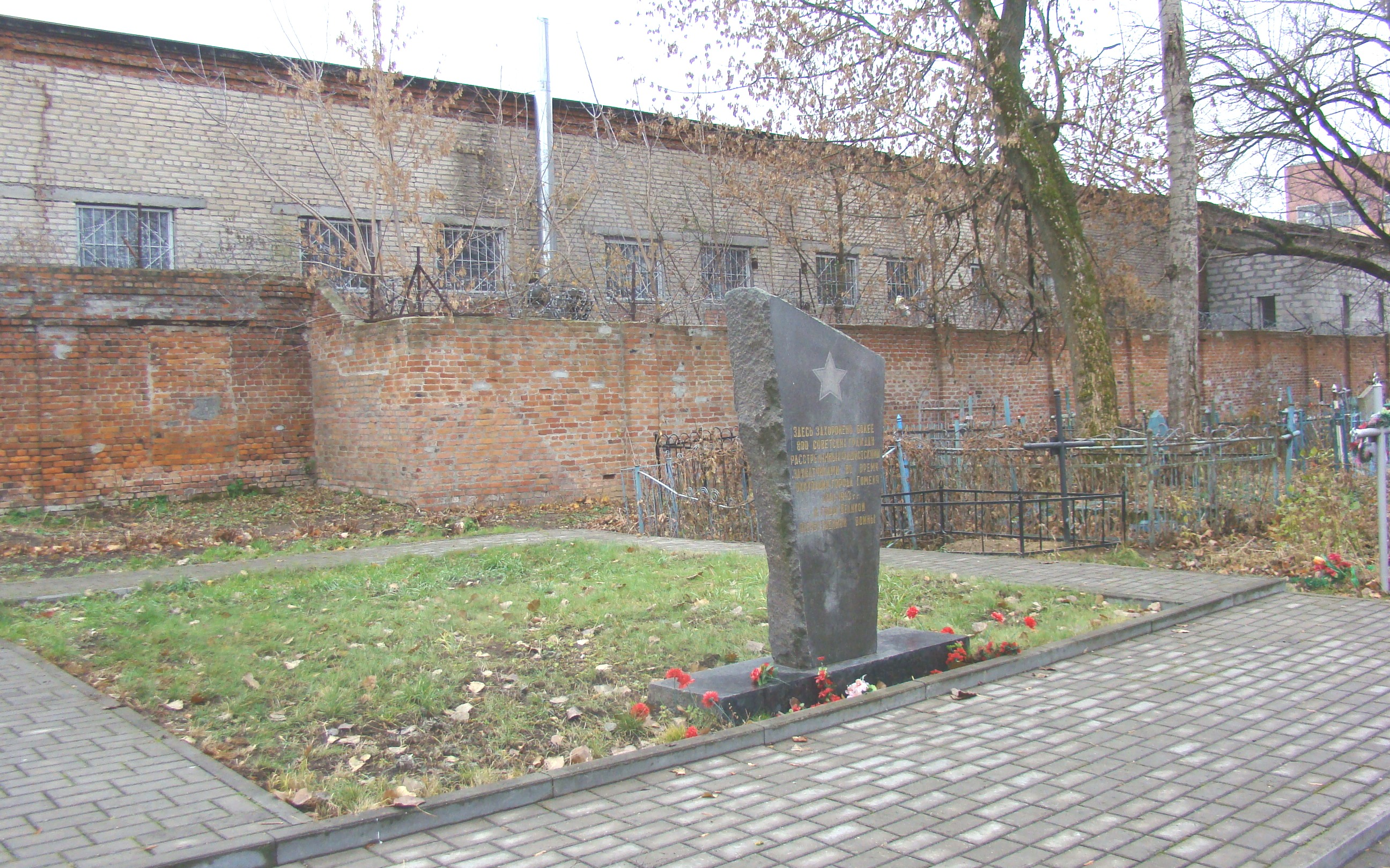 Памятник евреям города Гомель, убитым нацистами в 1941-1943 годах на территории автобусного парка №1. Их останки в 1962 году были перезахоронены на Лещинском кладбище, и на братской могиле возведен данный монумент.